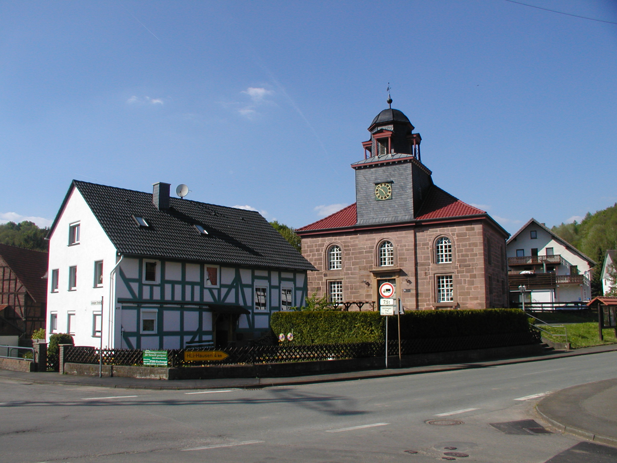 Bild der Dorfkirche Küchen Werra Meißner Kreis Ortsteil von Hessisch Lichtenau